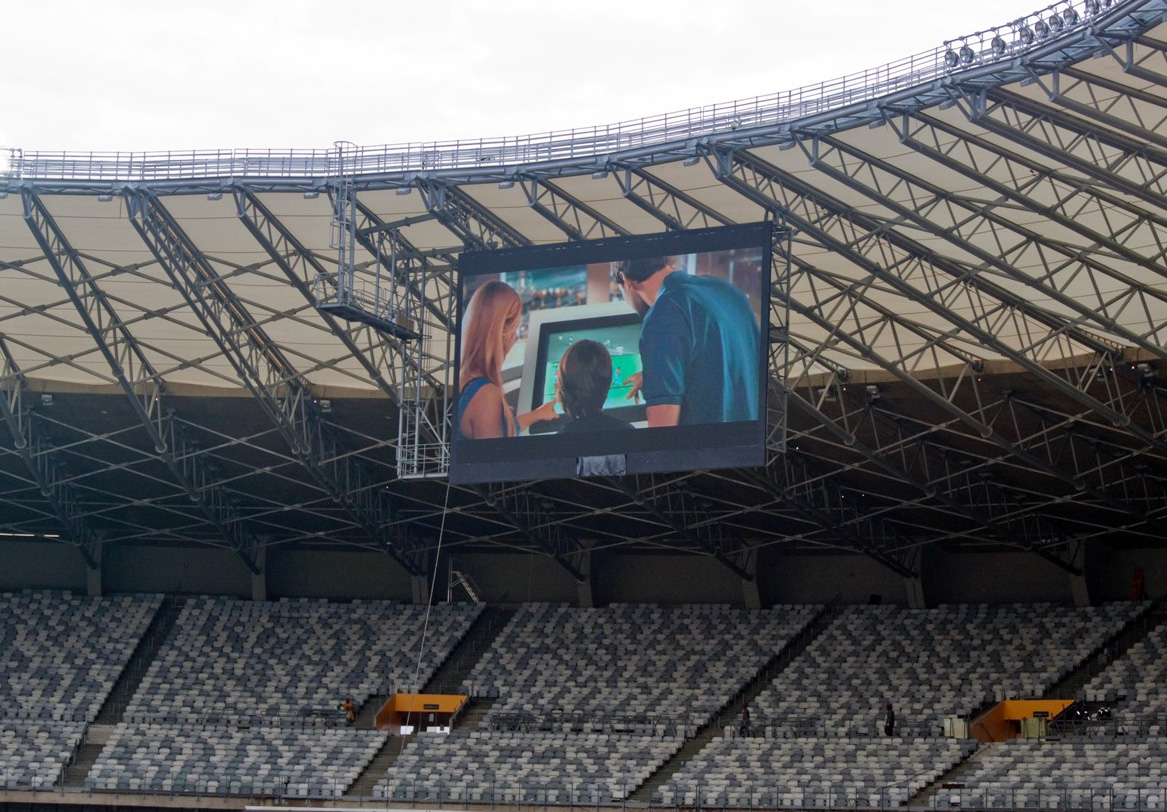 Placar eletrônico (telão) do estádio Mineirão.